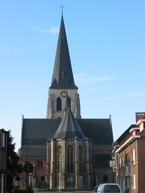 Sint-Lambertuskerk in Ekeren (Antwerpen)